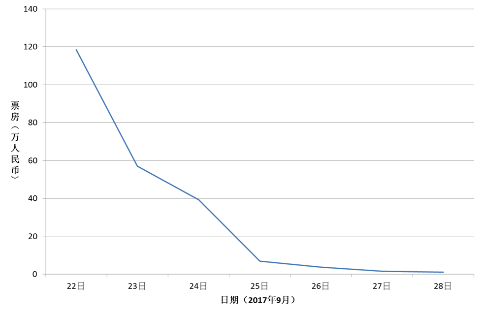 《纯洁心灵·逐梦演艺圈》第一次上映期间的票房